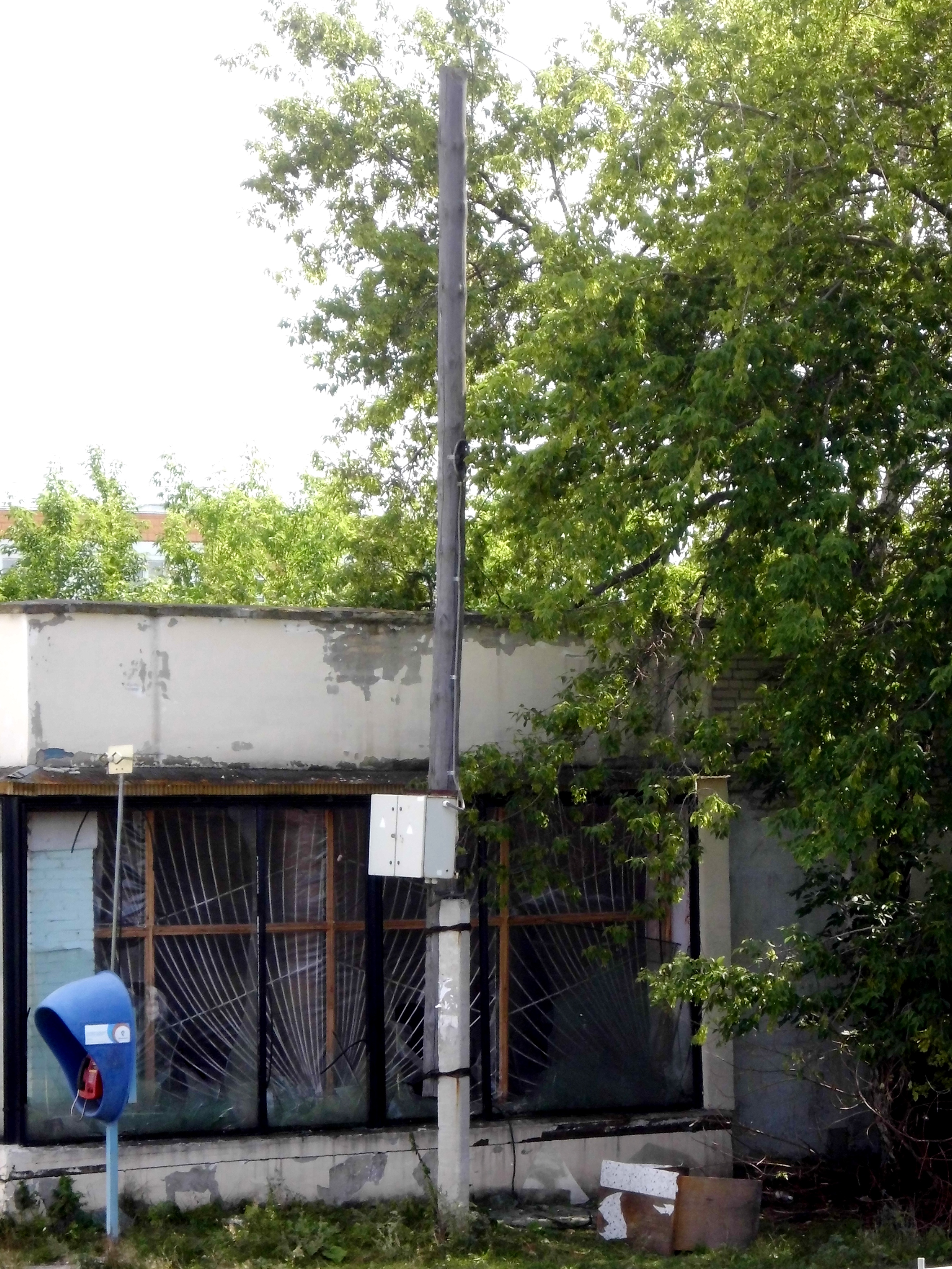 Деревянная опора воздушной линии электропередачи в сельской местности с железобетонным низом. Столб использован в качестве вспомогательного для кабеля деревенского таксофона установленного по Федеральной целевой программе телефонизации села Д.А.Медведевым. Челябинская область.